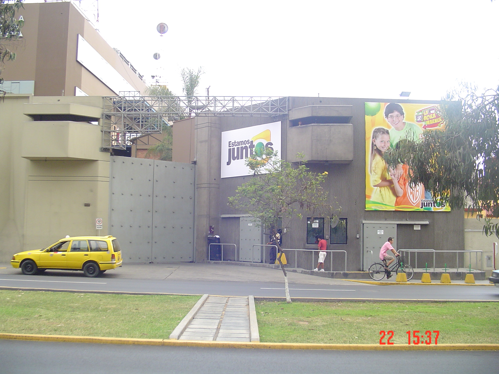 Fachada del canal de televisión Frecuencia Latina.